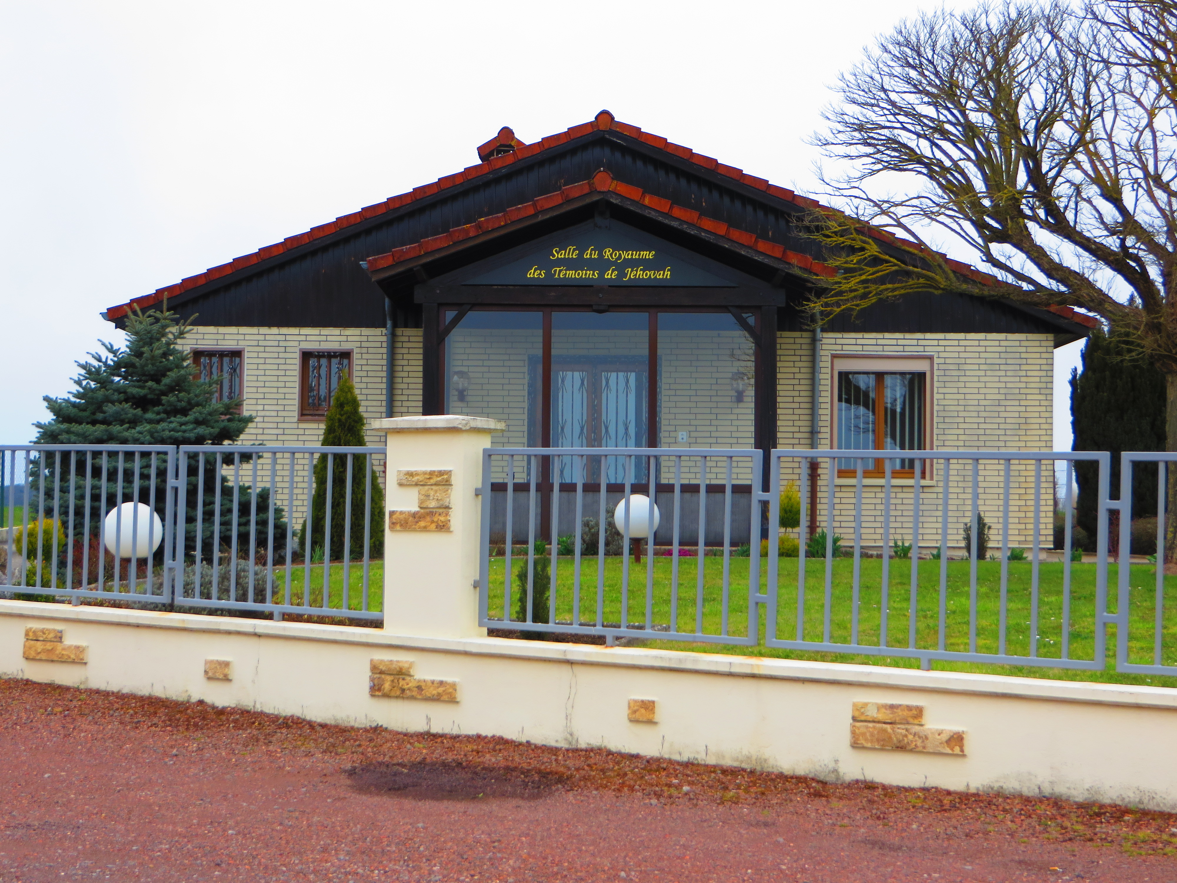 Remering Puttelange jehovah